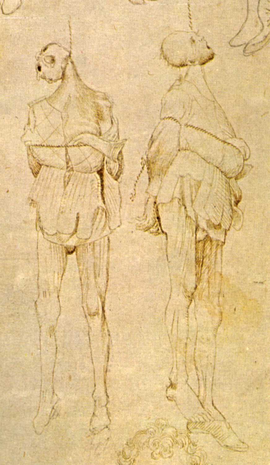 Pisanello, disegni, british museum 1859.9.15.441 (2) impiccati